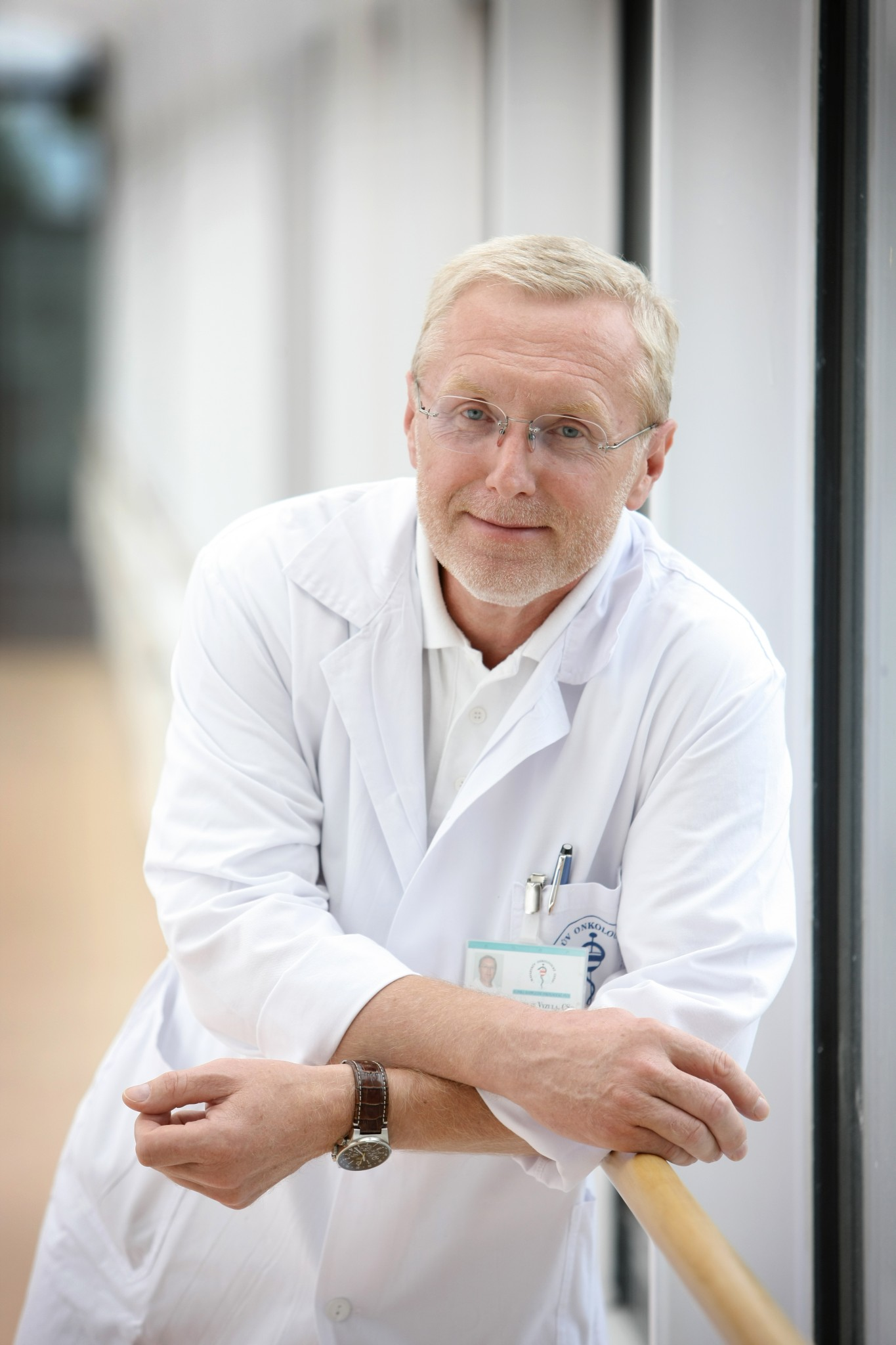 Prof. MUDr. Rostislav Vyzula